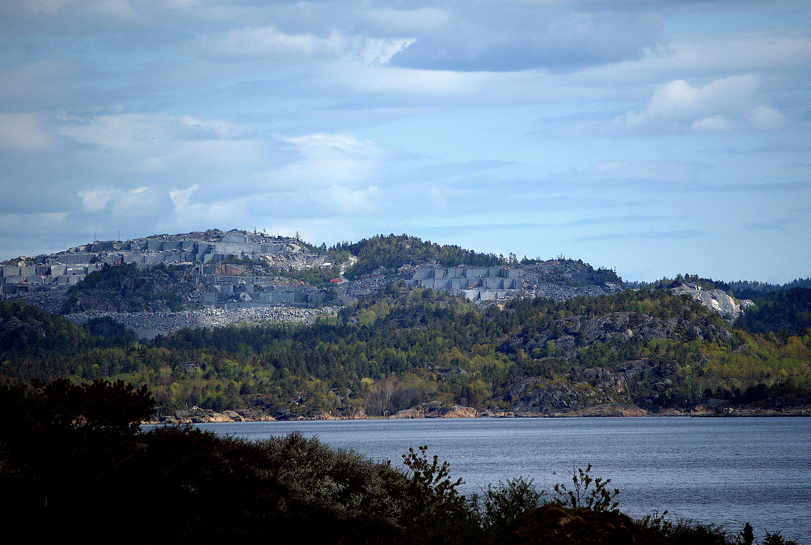 Tvedalen steinbrudd larvikitt